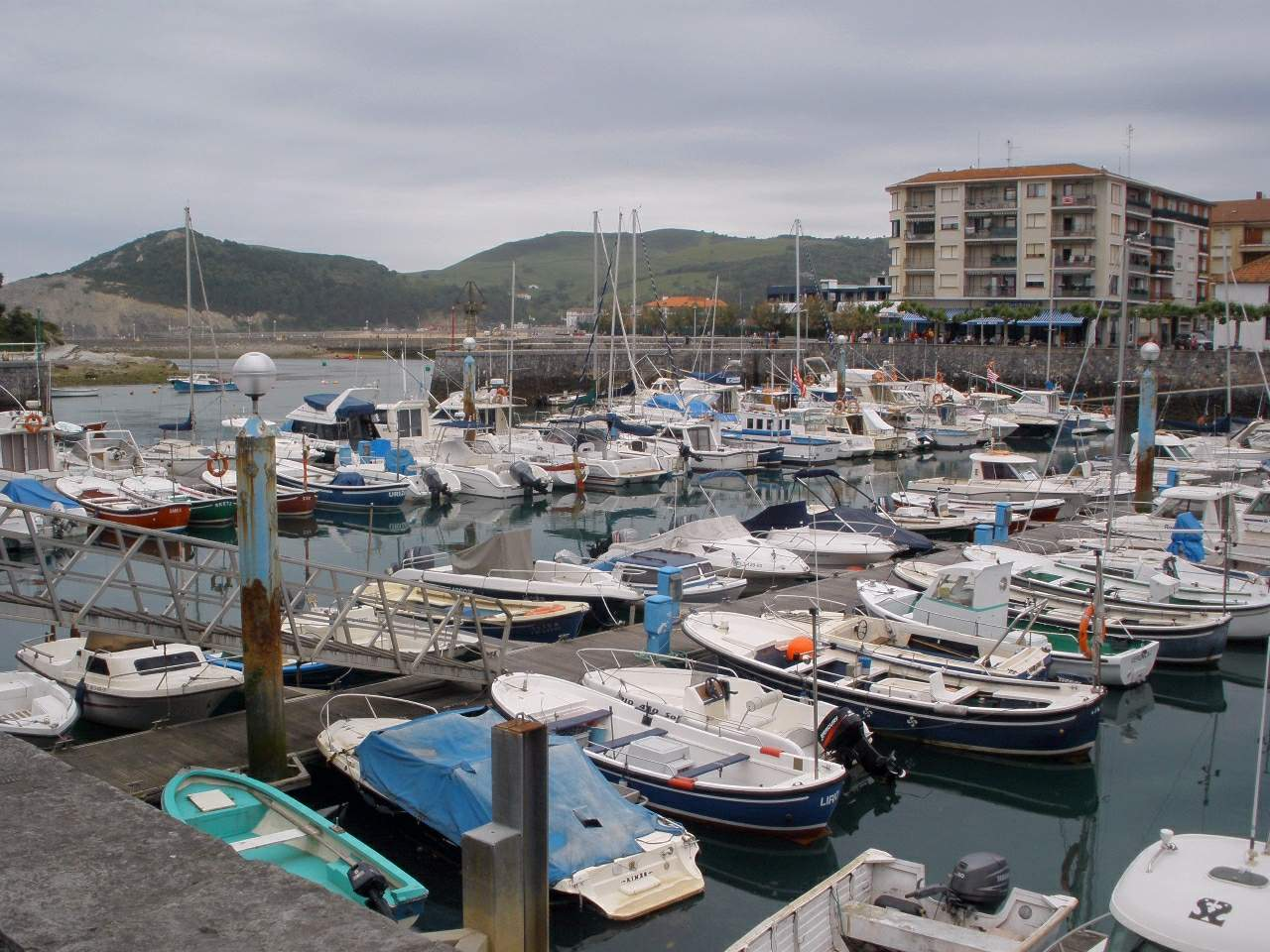 Port of Plentzia (Biscay)